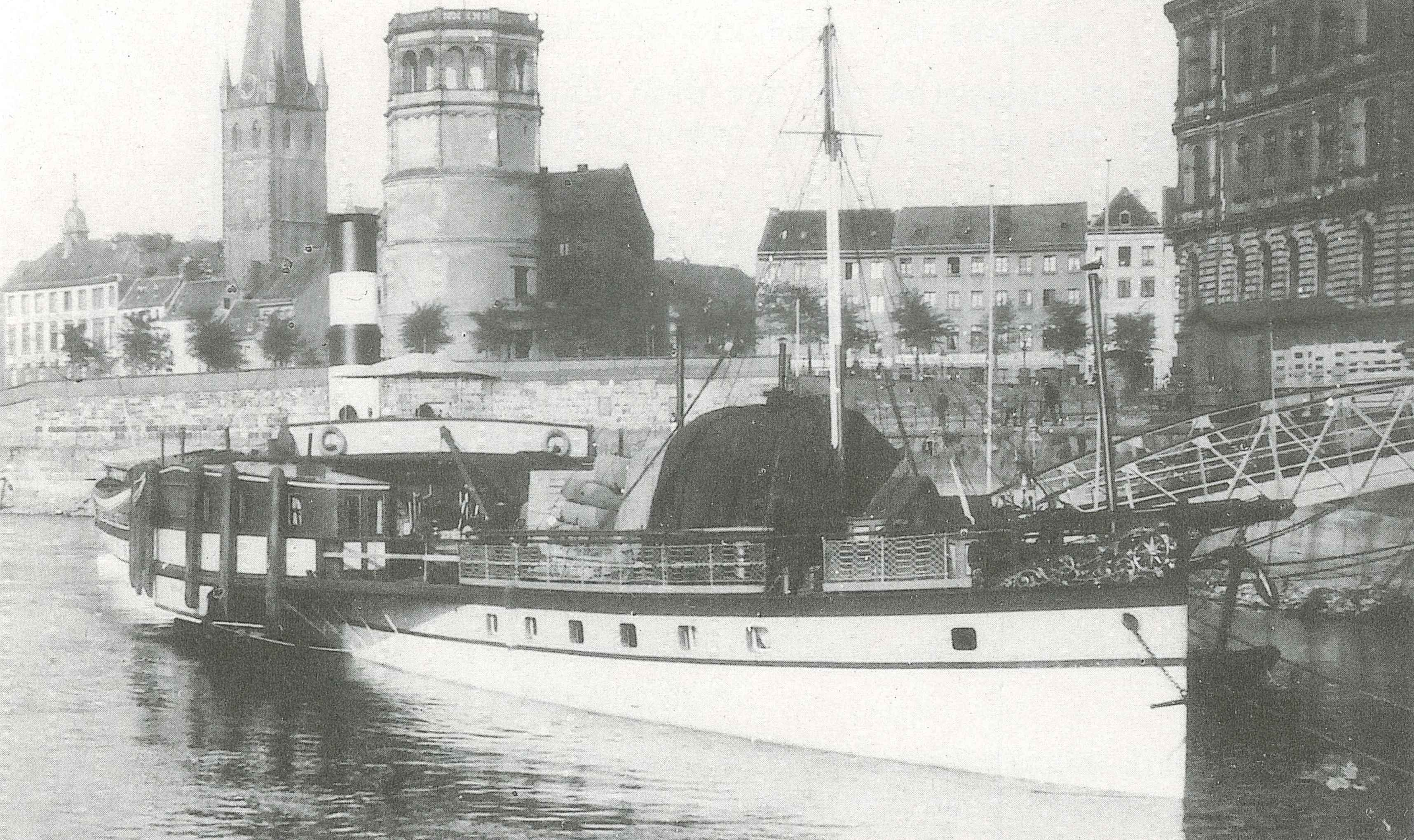 Der Raddampfer Bismarck am Anleger Düsseldorf.